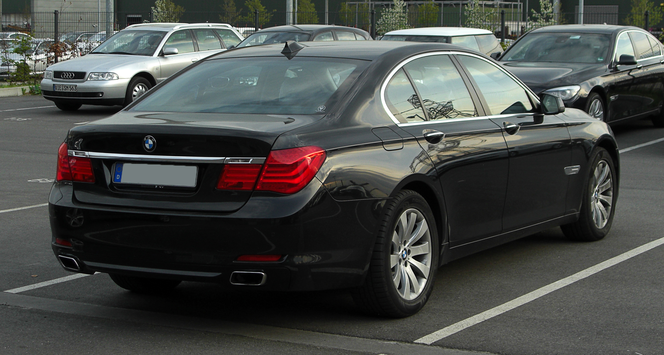 BMW 7er (F02)